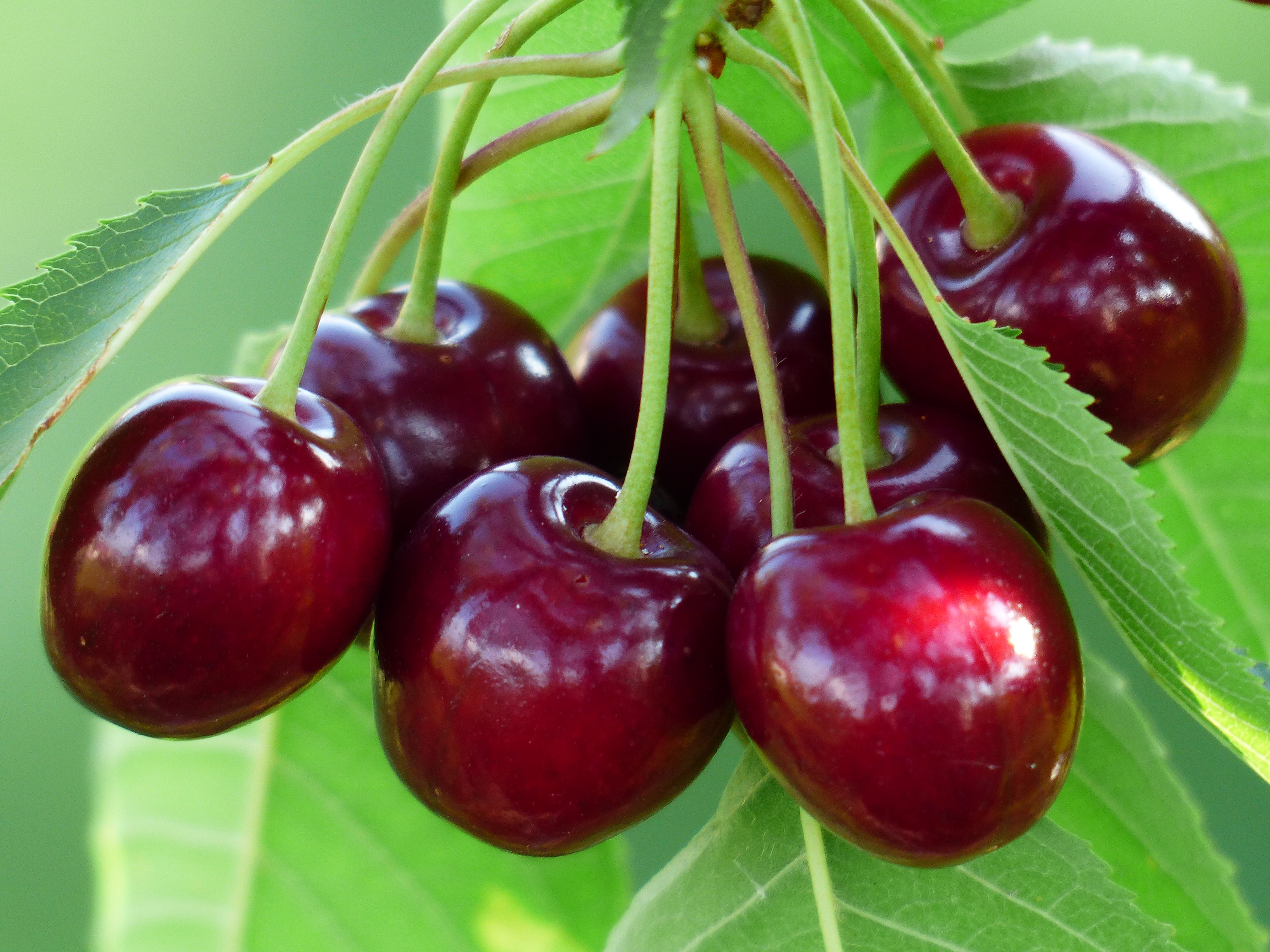 Des cerises.